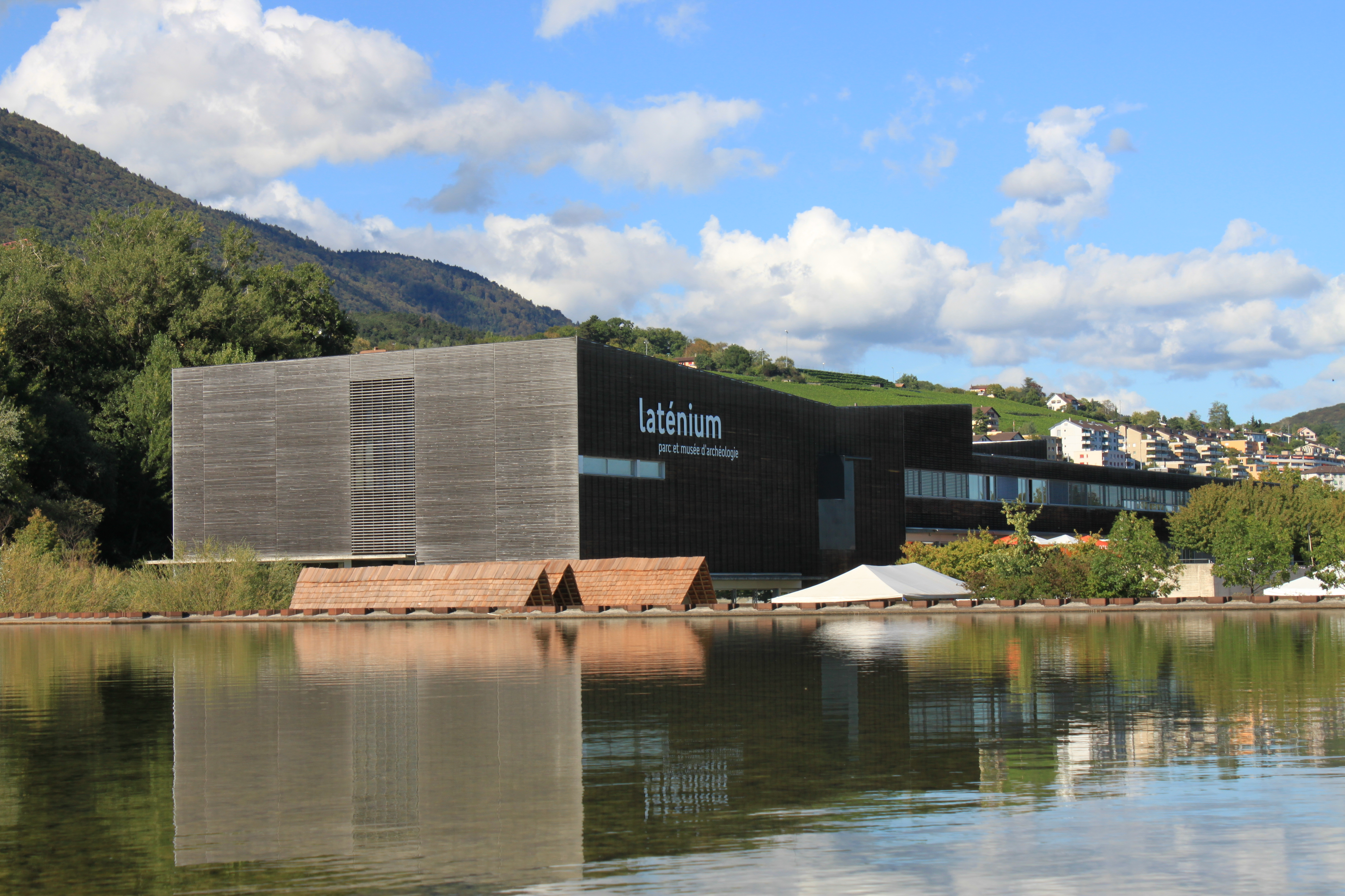 Bâtiment du musée cantonal d'archéologie (Laténium)